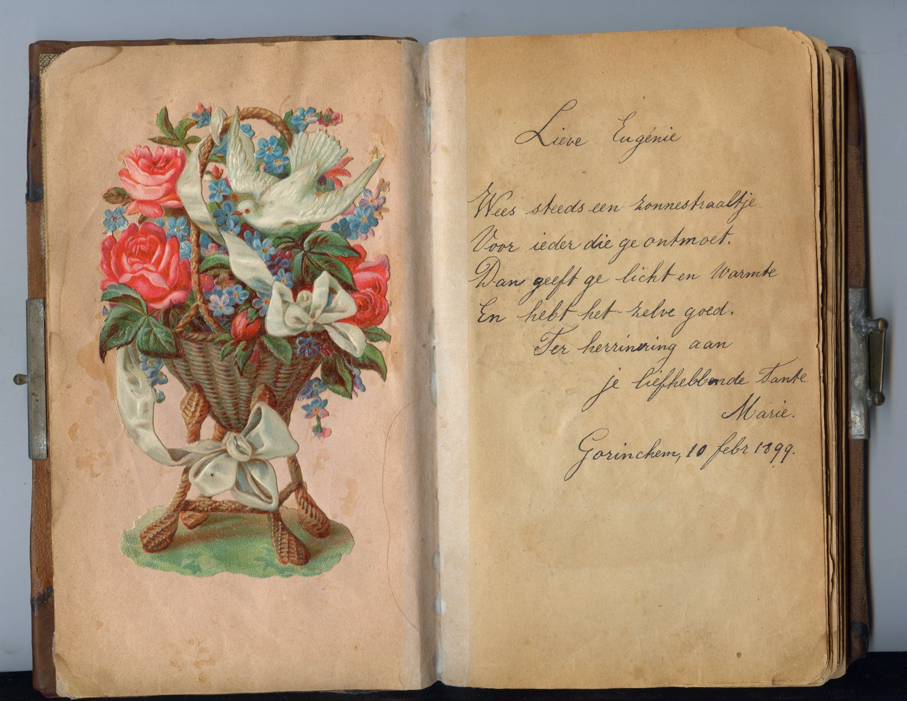 Scan bladzijde poesiealbum 1899 overgrootmoeder in eigen bezit